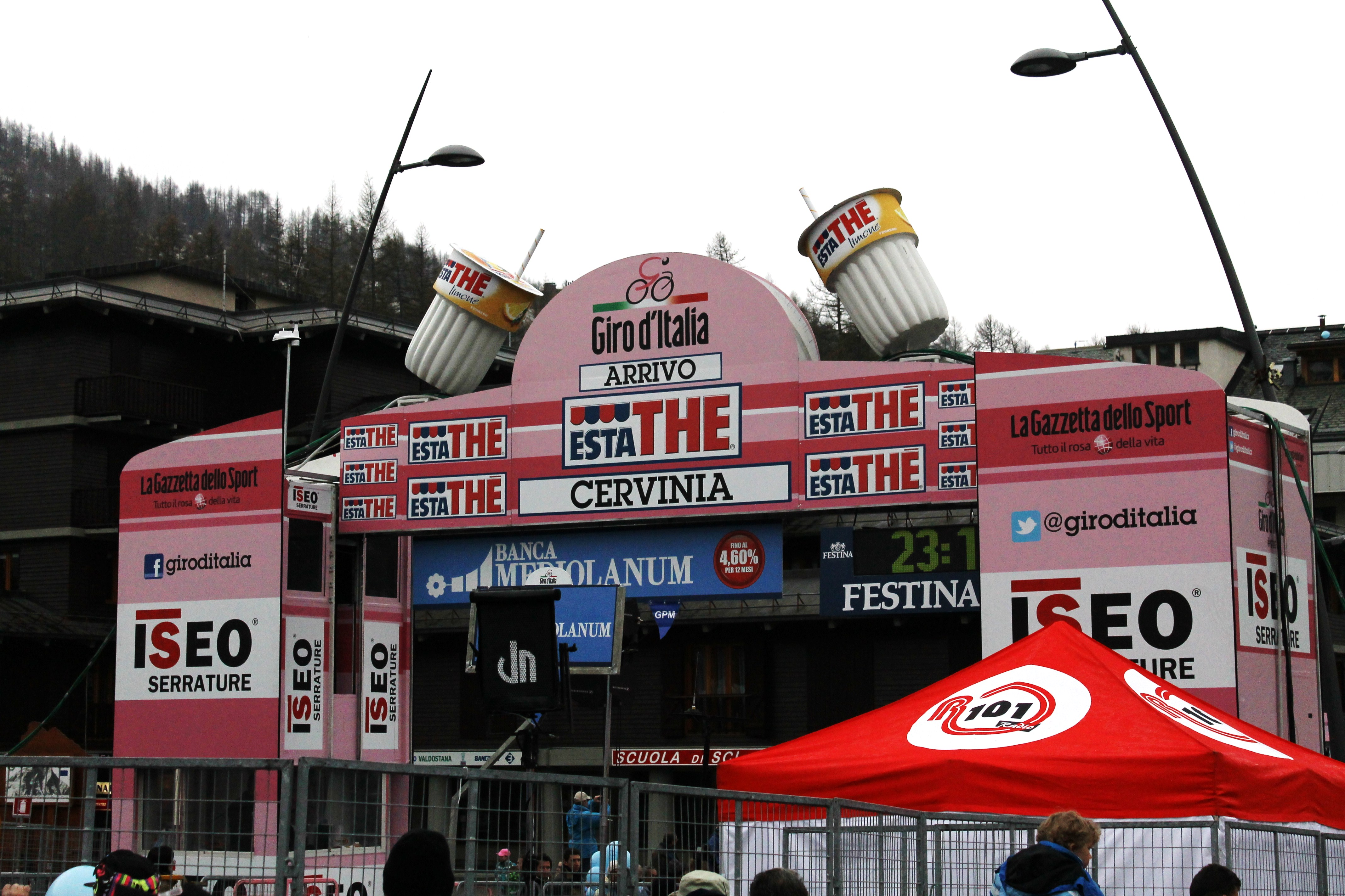 L'arrivo del Giro d'Italia 2012 a Cervinia, 14a tappa